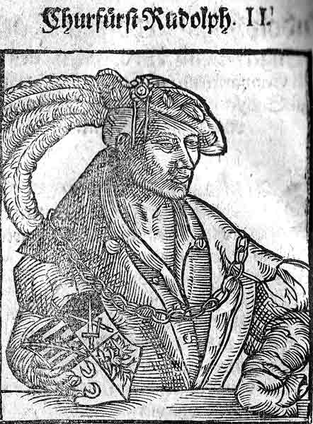 Rudolf II. von Sachsen Holzschnitt aus dem 16. Jahrhundert Afbeelding:Rudolf-II-von-Sachsen.jpeg